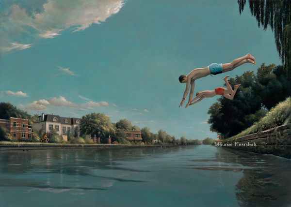 Waterschap schilderij: de Vliet, titel "Forbidden Fruit".